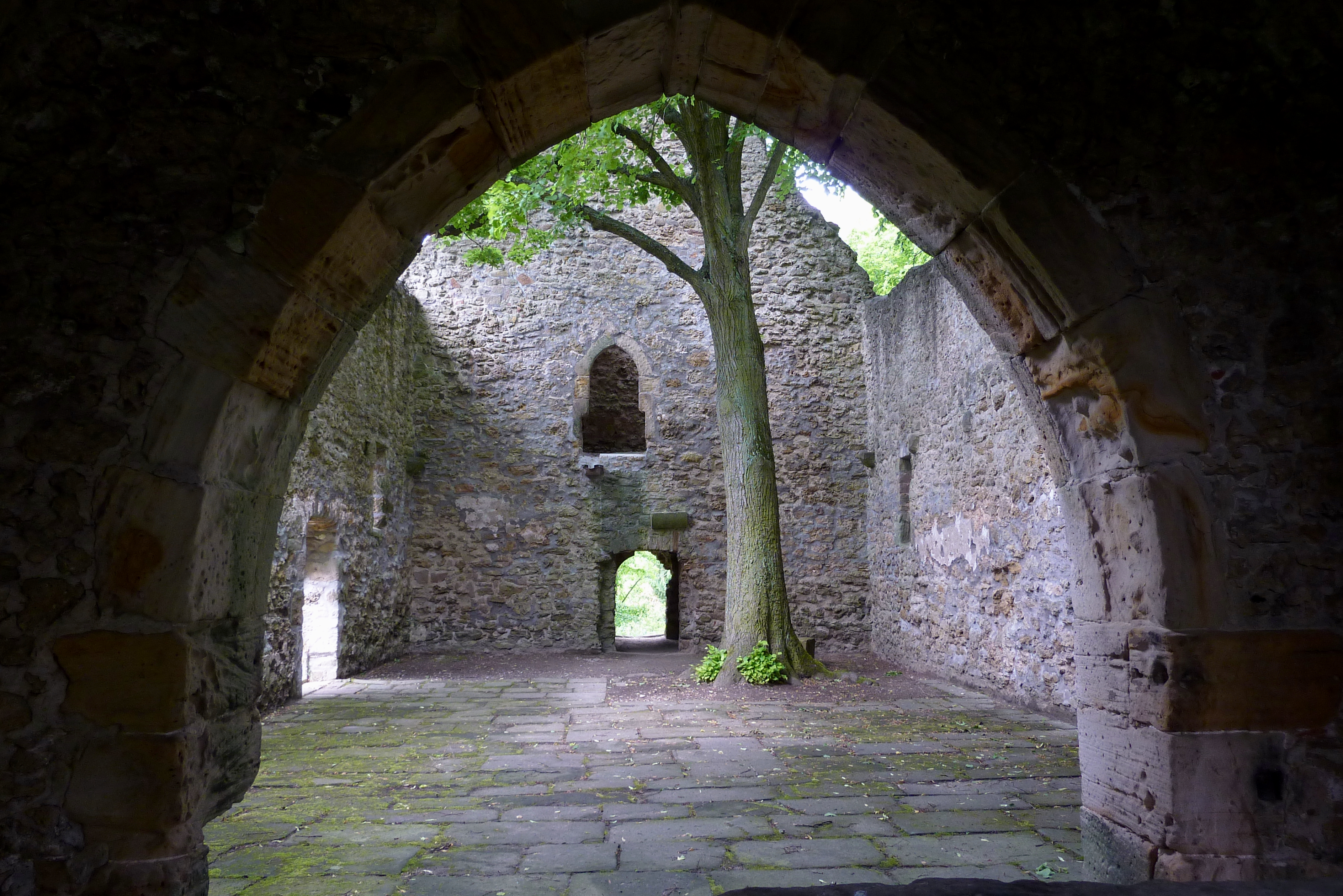 Die Totenkirche, ehemalige evangelische Pfarrkirche von Abterode, einem Ortsteil von Meißner im Werra-Meißner-Kreis (Hessen), aus dem 14. Jh. Blick vom Chor ins Schiff.